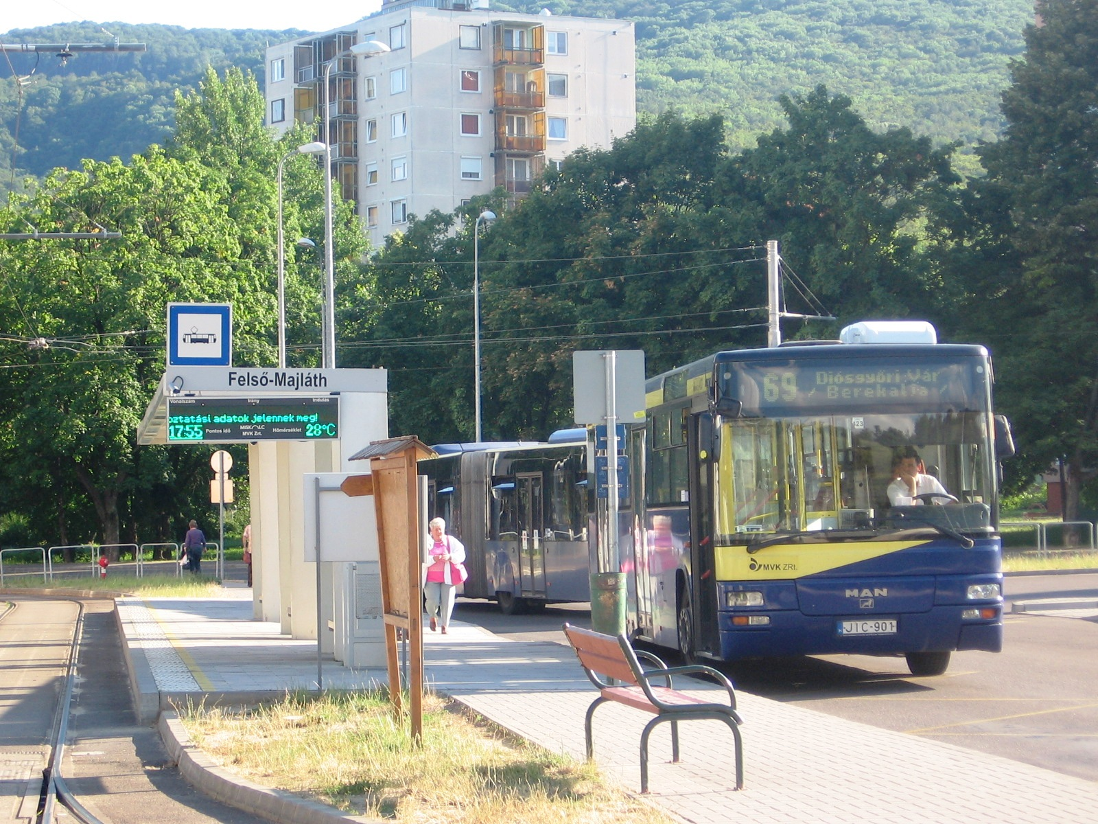 A 69-es busz Felső-Majláth átszállópontnál, Miskolc-Diósgyőrben. A Zöld Nyíl programban az 1-es villamost eddig hosszabbították, és átszállópontot alakítottak ki P+R parkolóval. Ezzel együtt az 5-ös, 15-ös és 69-es buszok végállomása is ez lett Diósgyőr vk. helyett